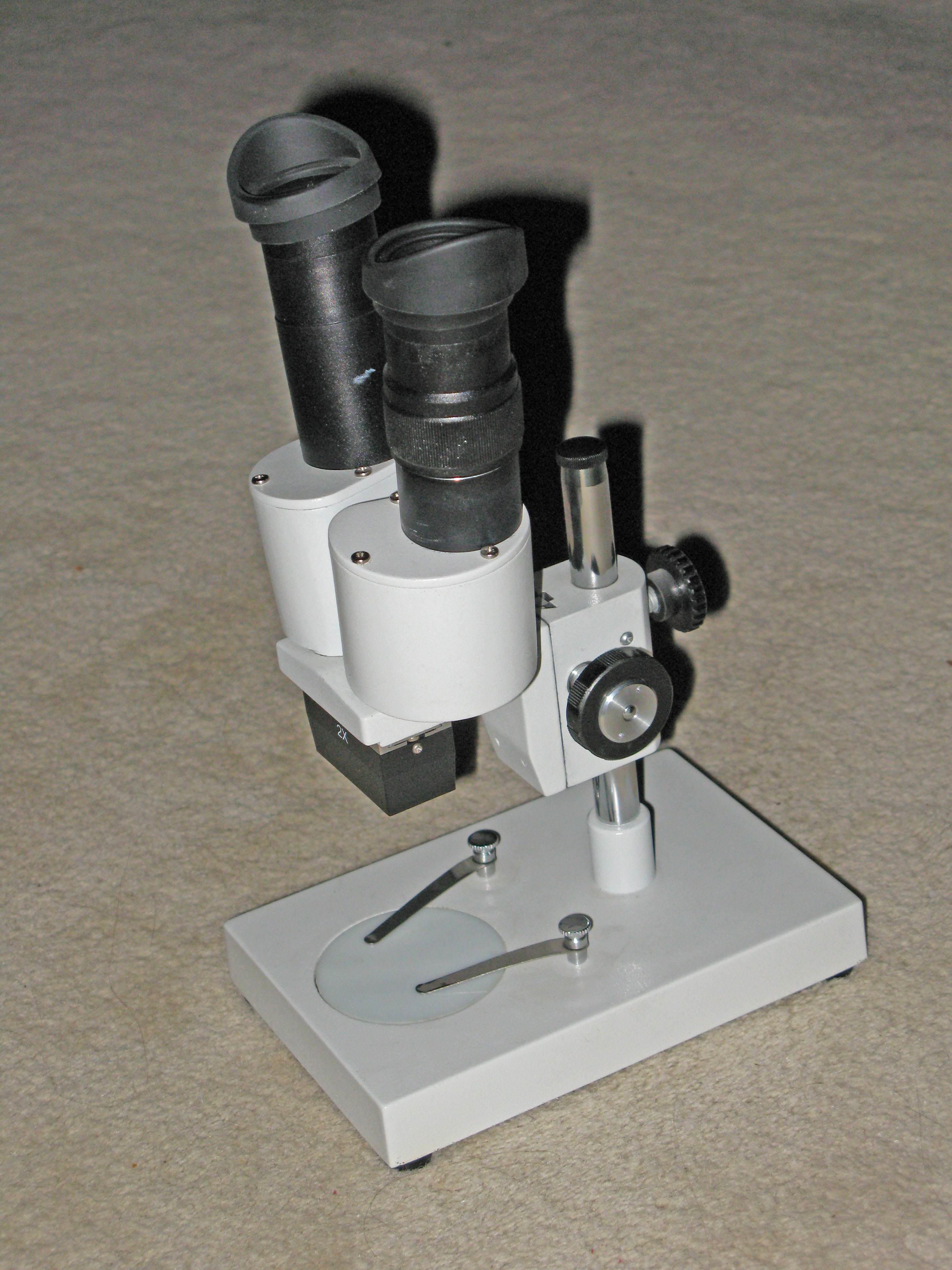 Binokularlupp Source:Eege Foto vum User:Cornischong Lizenz: Biller-GFDL